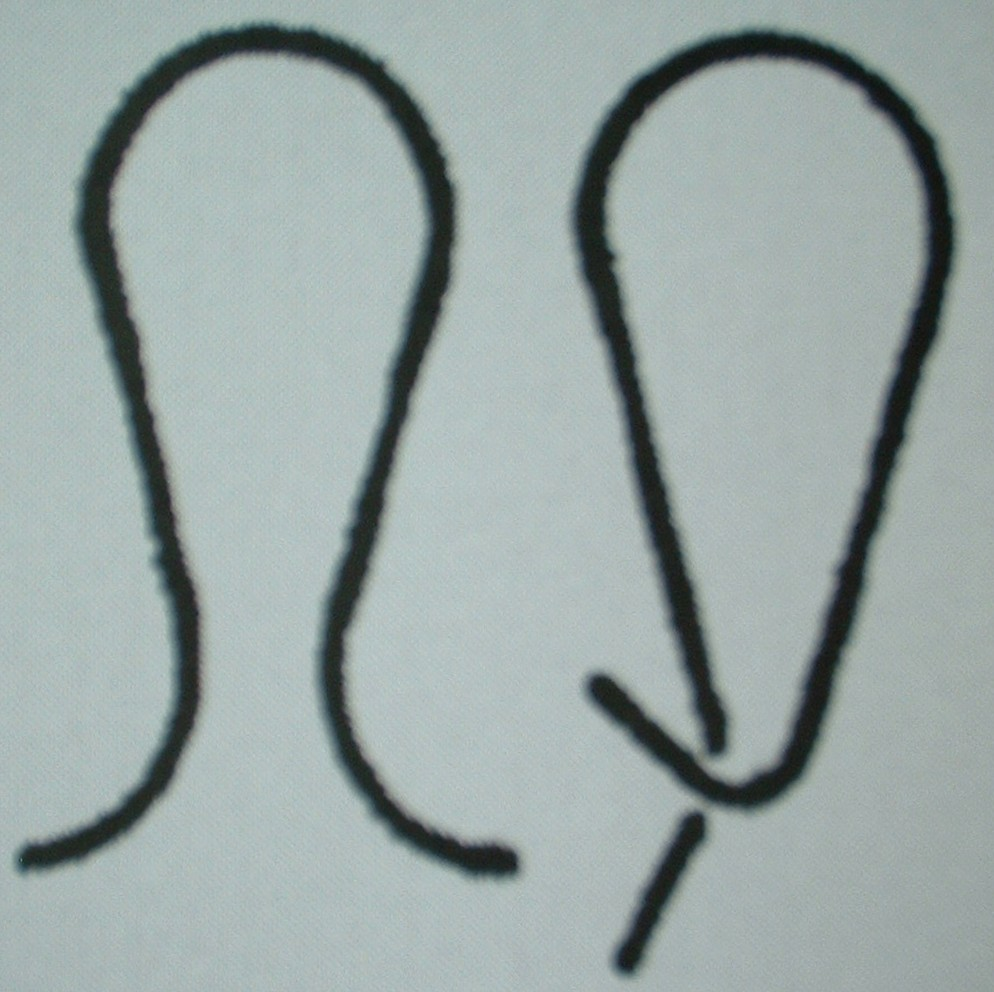 Offene und geschlossene Maschenschleife